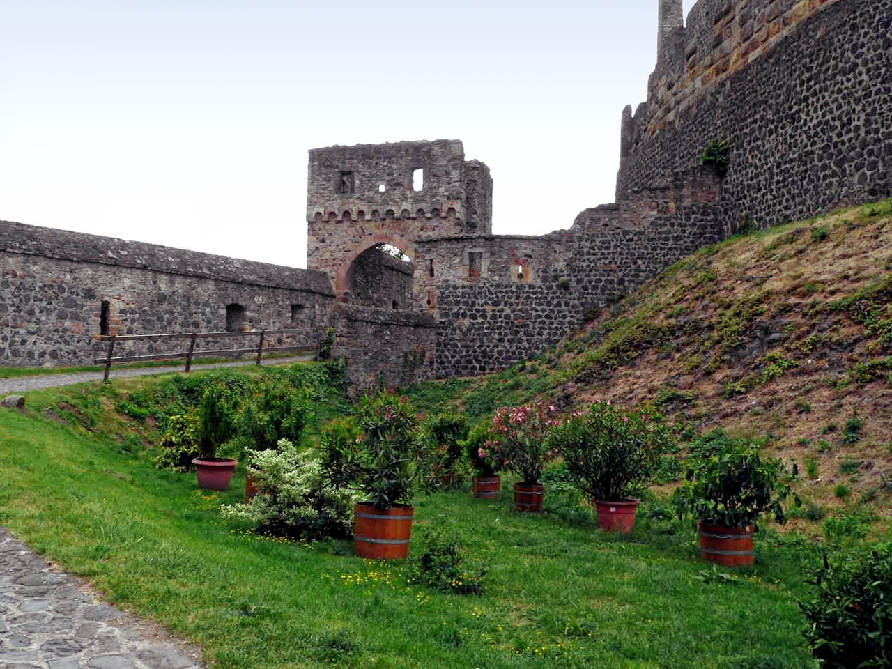 Mittleres Tor der Vorburg der Burg Münzenberg in Hessen, Germany